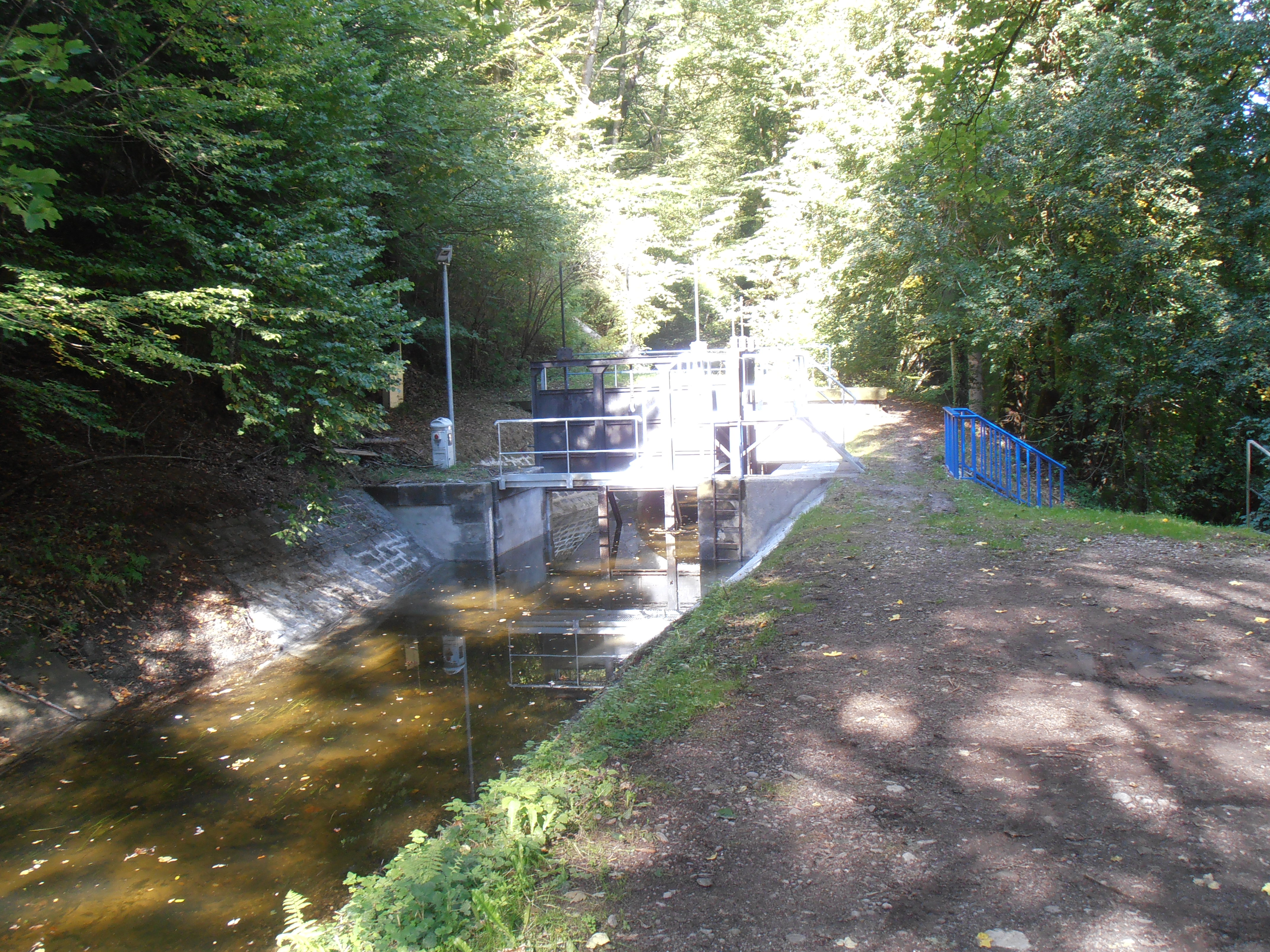 Vosges, Moraine de Noirgueux sur les communes de Saint-Nabord, Saint-Étienne-lès-Remiremont, Éloyes, Remiremont : écluse sur le canal de Bouzey sur le sentier de la "moraine de Noirgueux". Les travaux d'édification de la rigole et de ses ouvrages entre la prise d'eau de Remiremont et Arches, sur 19,467 km, ont débuté en 1882 et ont été terminés en 1887 (Extrait de « Le canal de l'Est, branche sud » par M. Boulet, ingénieur en chef des Ponts et Chaussées du département des Vosges, Science et industrie, 1935). La rigole principale débute à Saint-Etienne-lès-Remiremont. Une partie de l'eau de la Moselle est déviée sur la rigole, où elle s'écoule par gravité sur plus de 45 kilomètres jusqu'au réservoir de Bouzey. De là elle se déverse dans le canal des Vosges et sert aux besoins de la navigation, essentiellement des plaisanciers (Le canal d'alimentation de Bouzey, panneau de signalétique sur le sentier pédagogique de la moraine de Noirgueux)